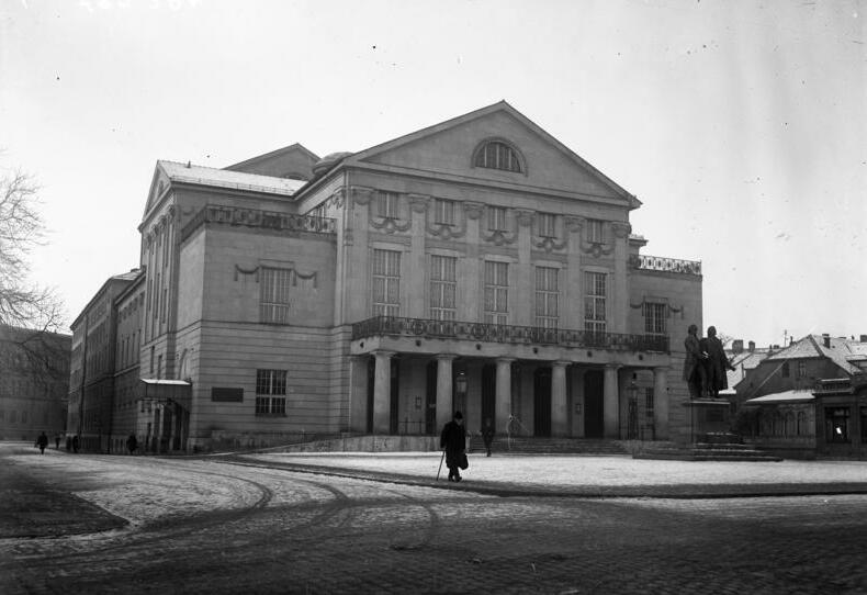 Theater in Weimar, wo die Verfassung des Deutschen Reiches hergestellt wurde.